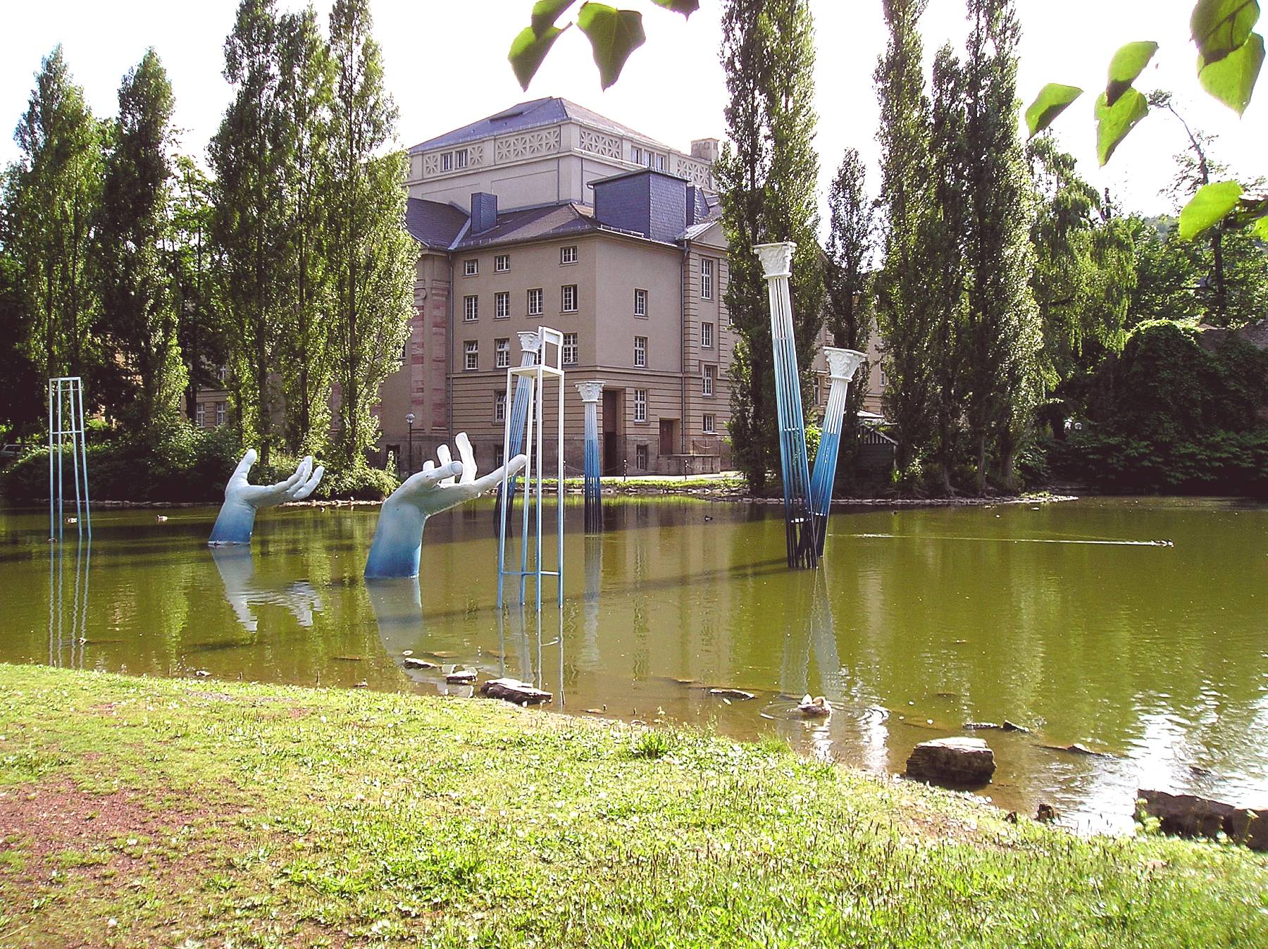 Kulissen für die Open-Air-Theateraufführung Faust II im Englischen Garten von Meiningen